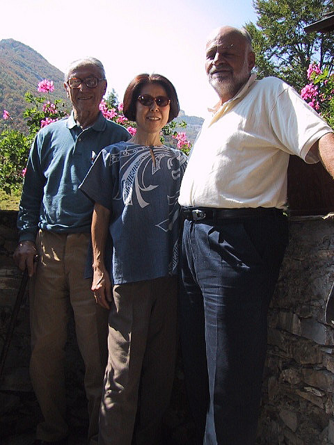 A fine giornata